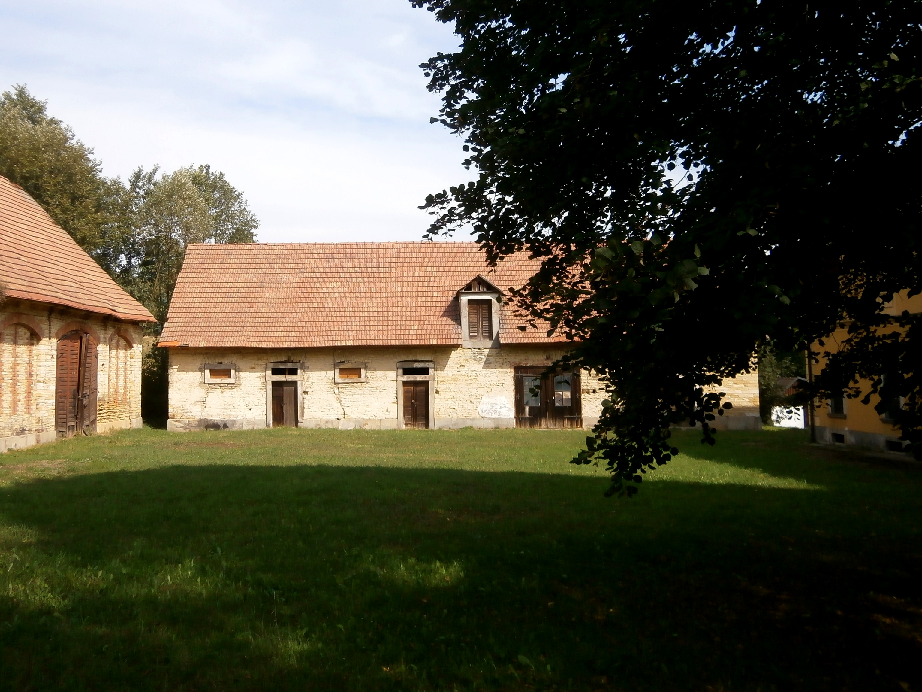 Mezilečí čp. 5 (Tylšův statek)